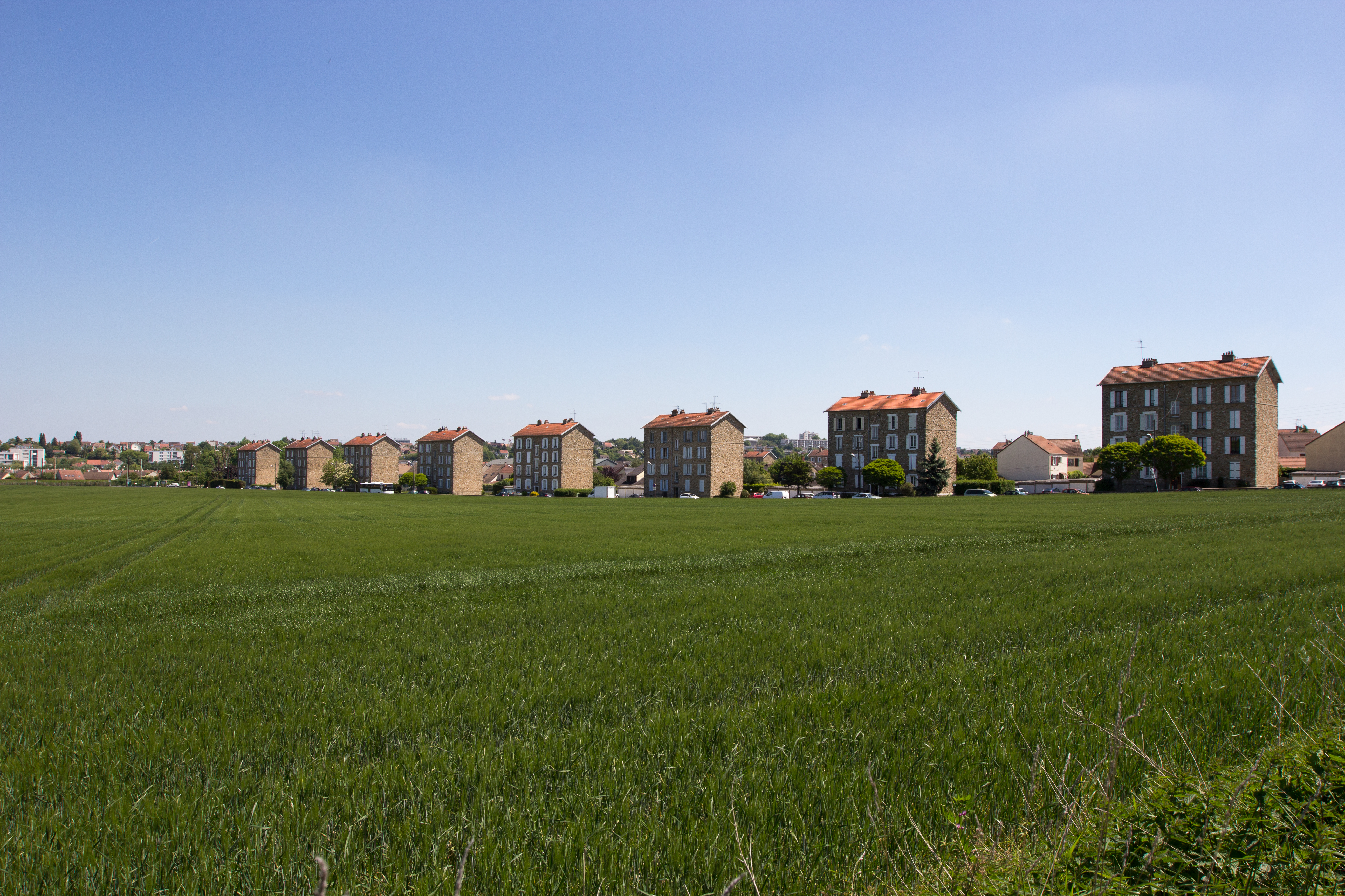 La cité Darblay le long du Cirque de l'Essonne à Villabé / Villabé / Essonne / France